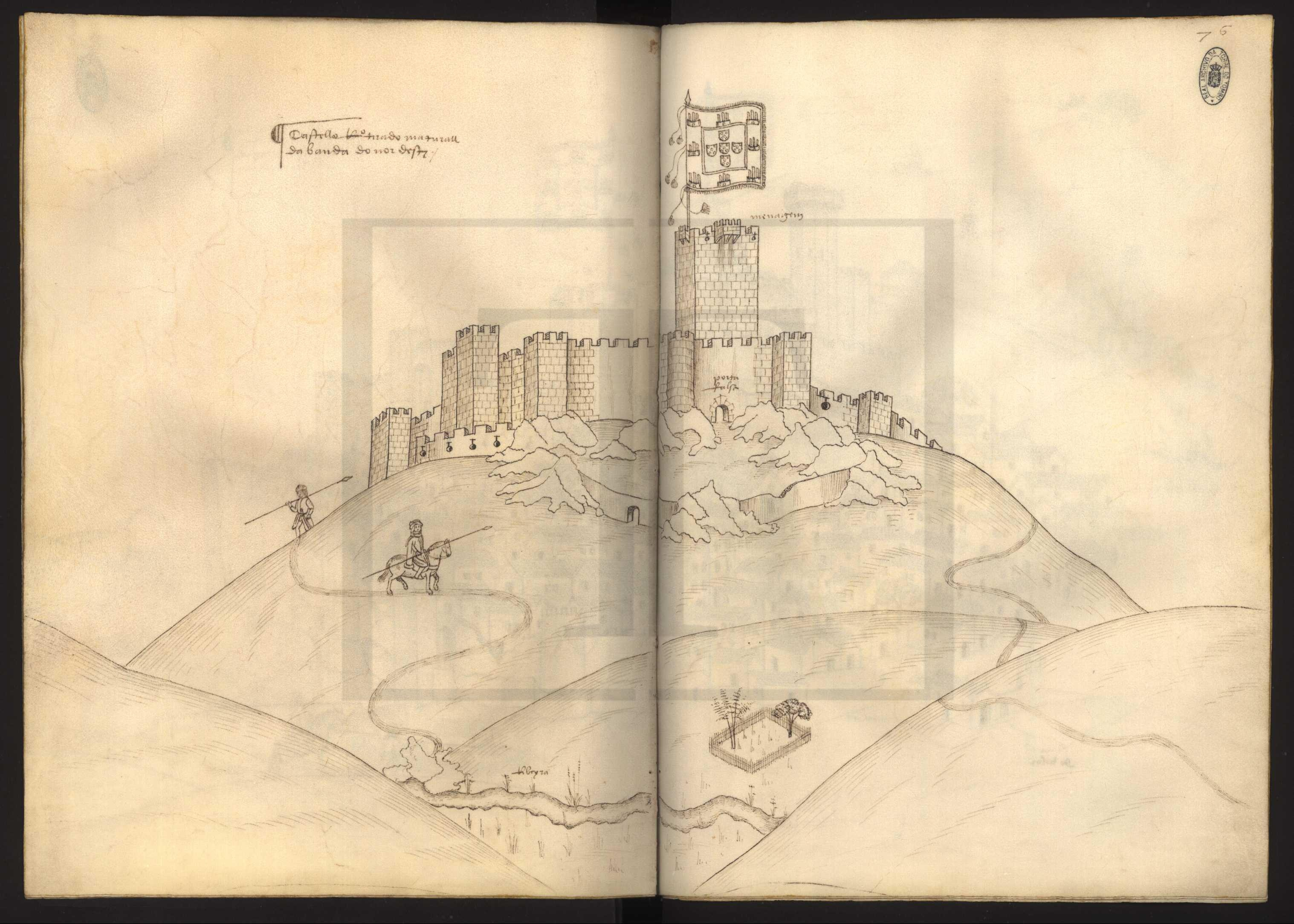 Livro das Fortalezas 76 - Castelo Rodrigo